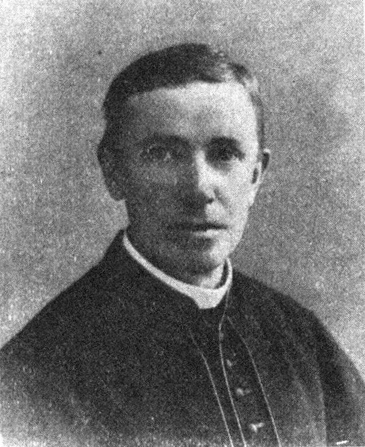 Österreichischer Politiker, Reichsratswahl 1907, Name siehe Dateiname